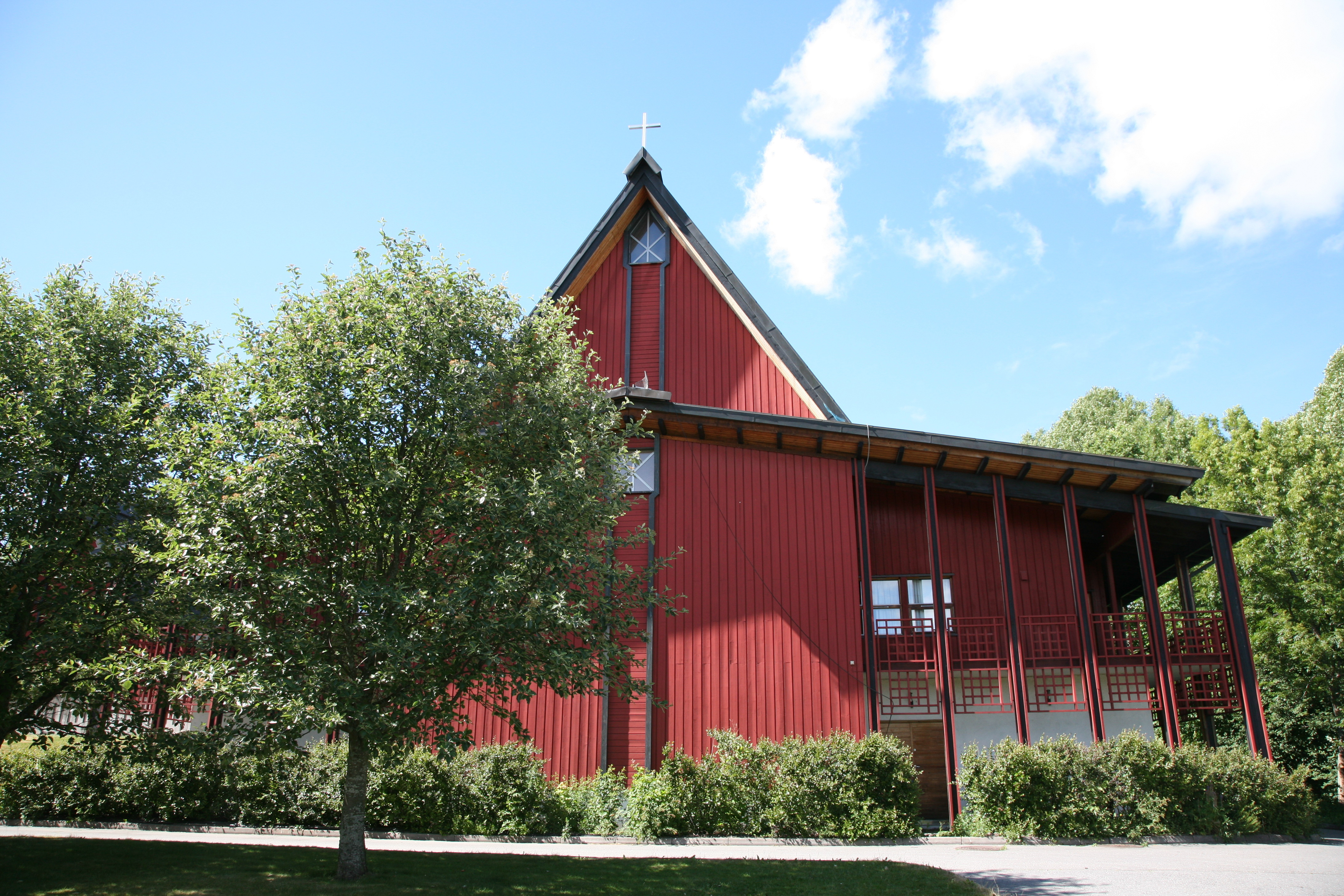 Fjellhamar church in Lørenskog, Akershus, Norway